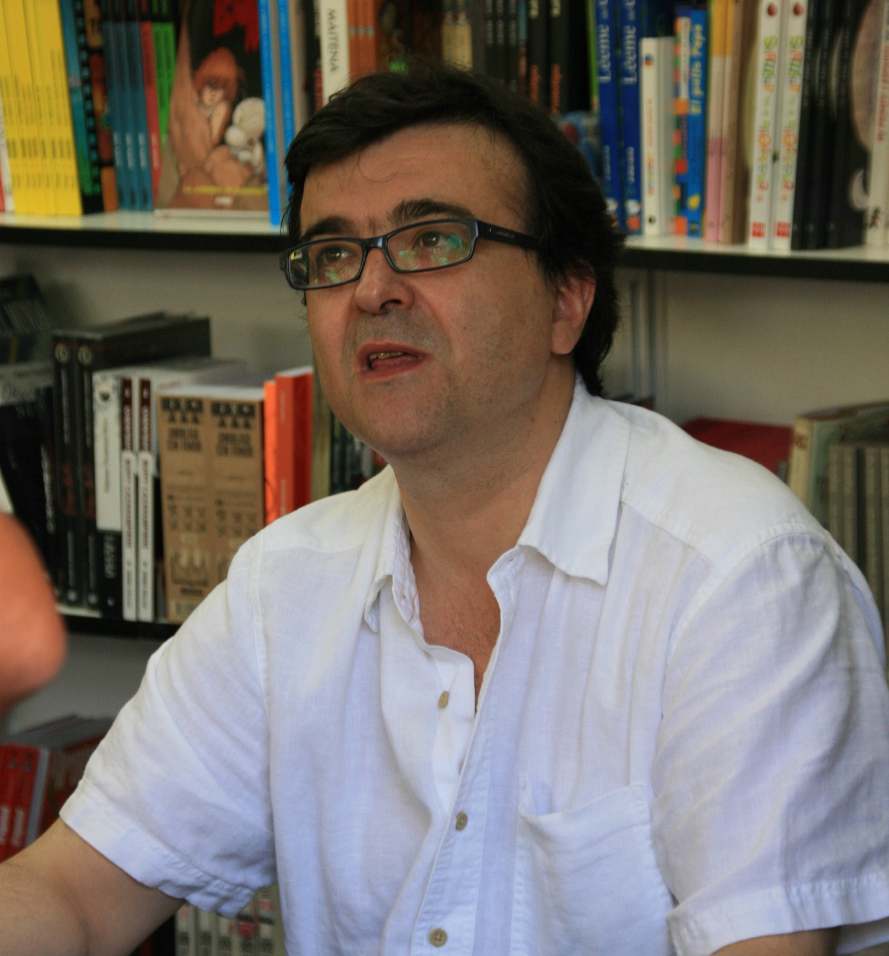 Javier Cercas firmando Anatomía de un instante en la Feria del Libro de Madrid 2009 (31 de mayo de 2009).